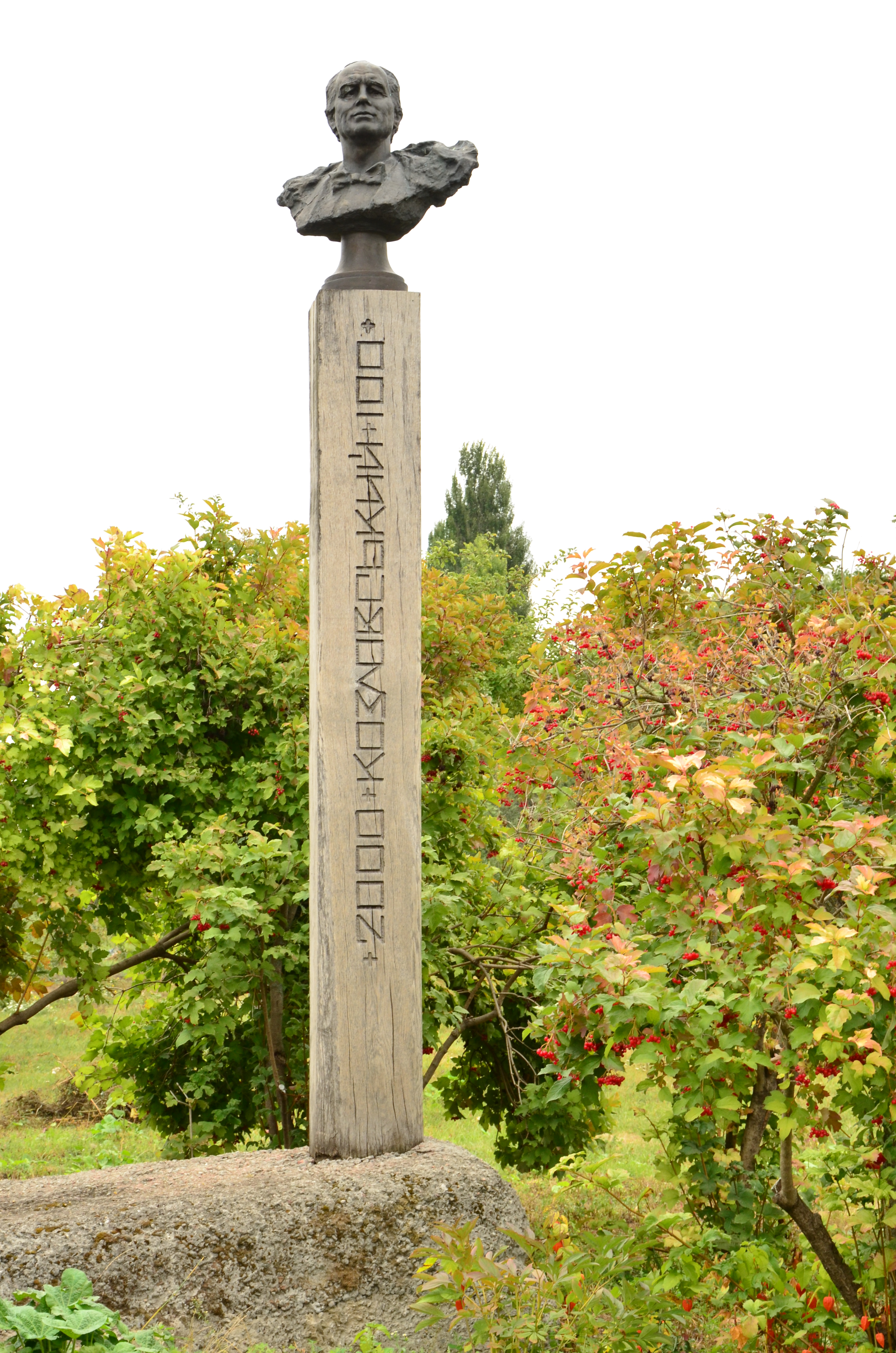 Садиба співака І. С. Козловського, Мар'янівка, вул. Шкільна, 3